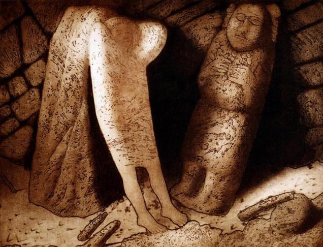 «Тёплый камень», офорт из серии «Тайны Таврии». 1988 г.